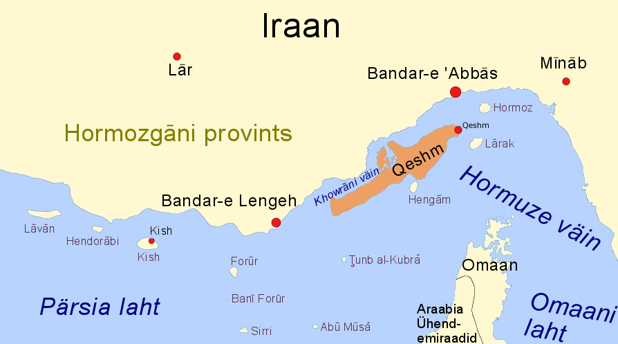 Qeshmi saare kaart